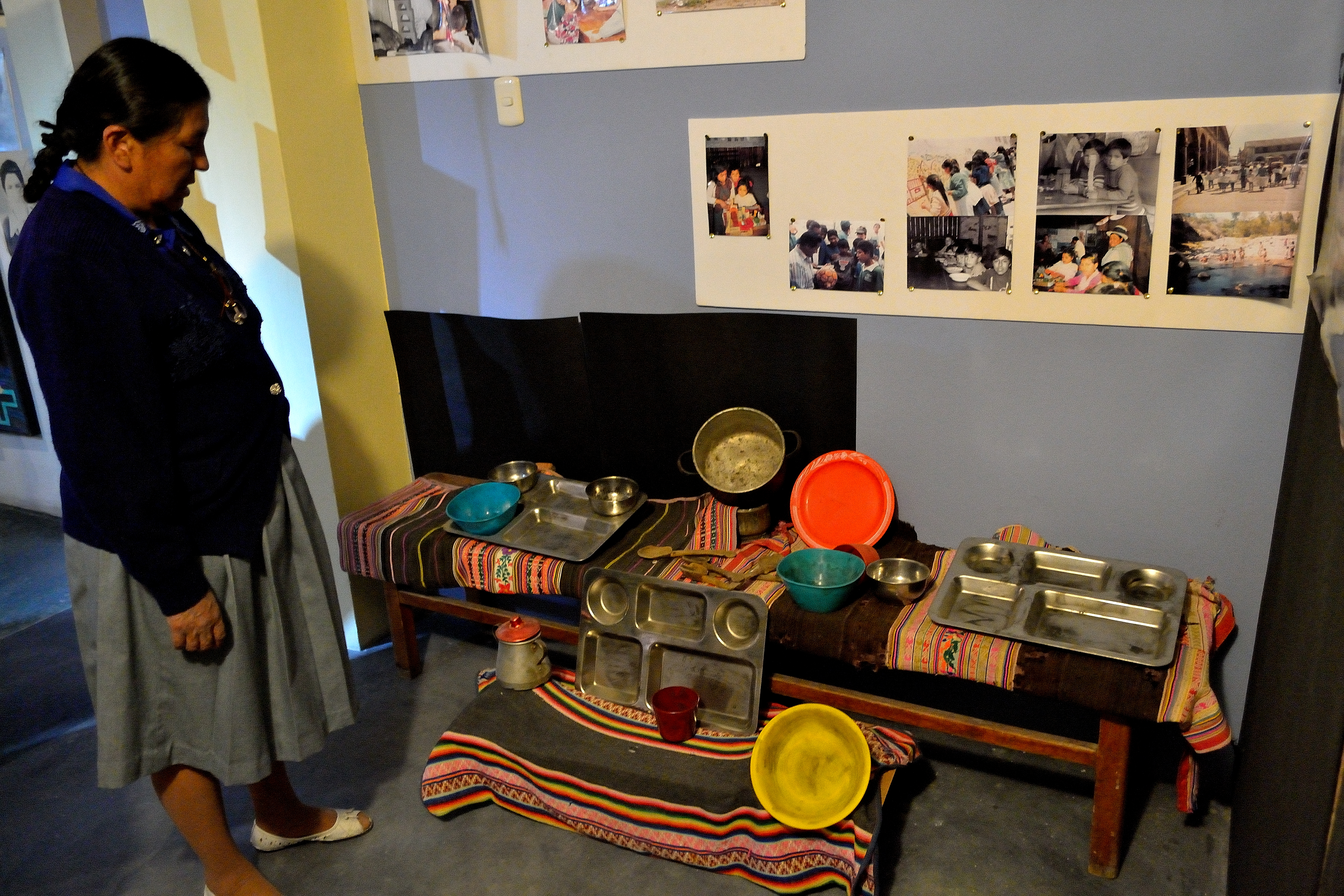 PLATOS Y PAILAS